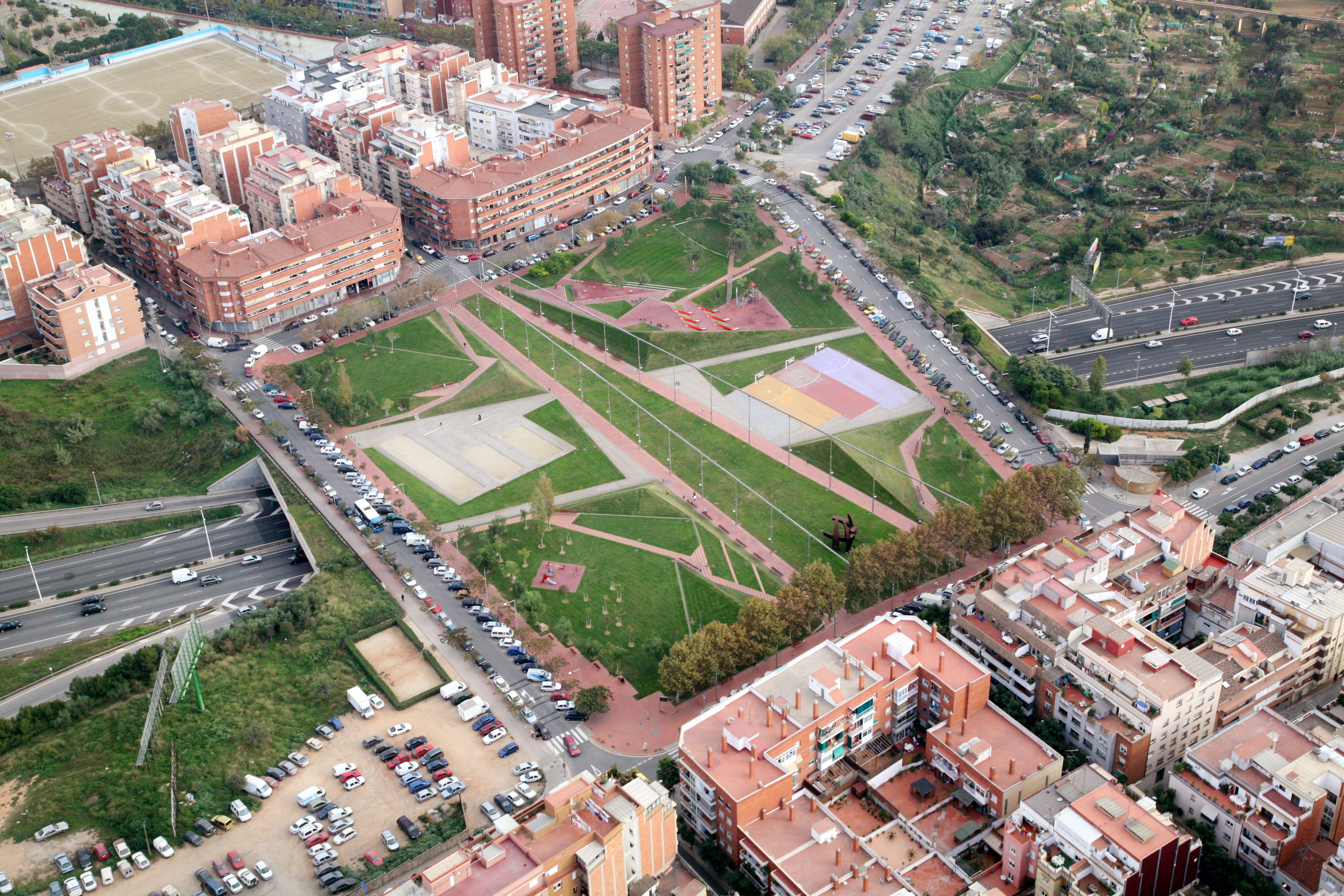 Imatge aèrea d'Esplugues de Llobregat